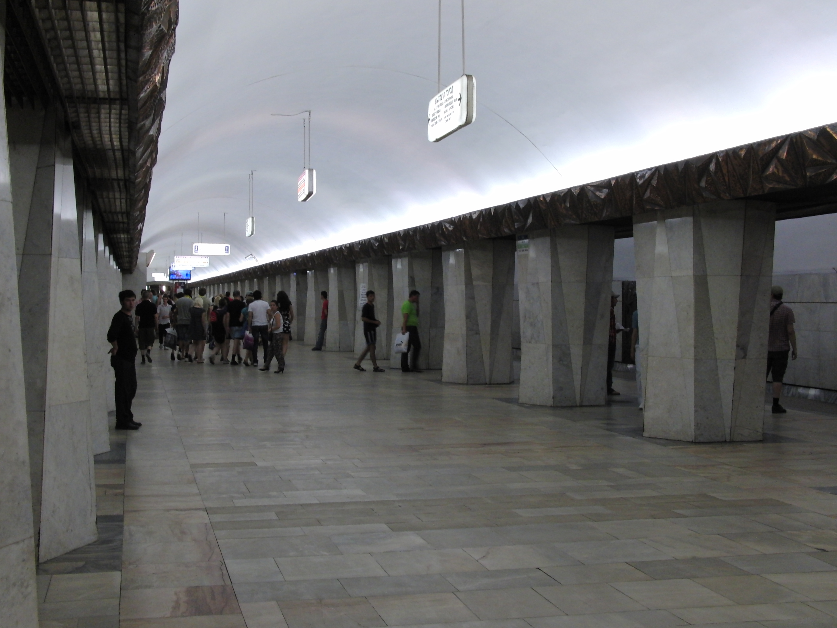 Kitay-Gorod